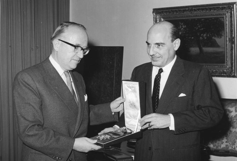 Ordenverleihung durch den Botschafter v. Cuba an Staatssekretär Hallstein